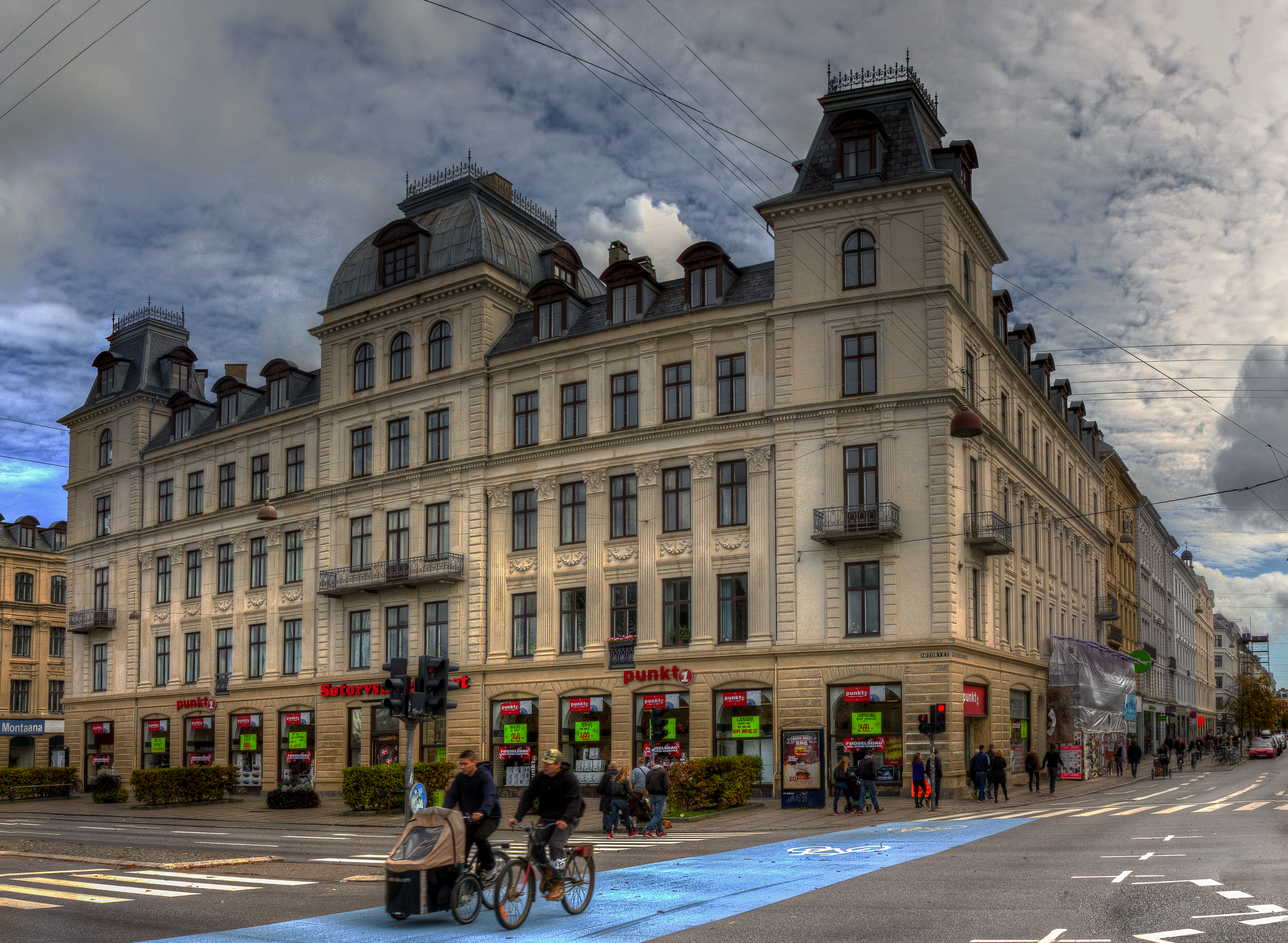 Søtorvet 2 - 1371 København K